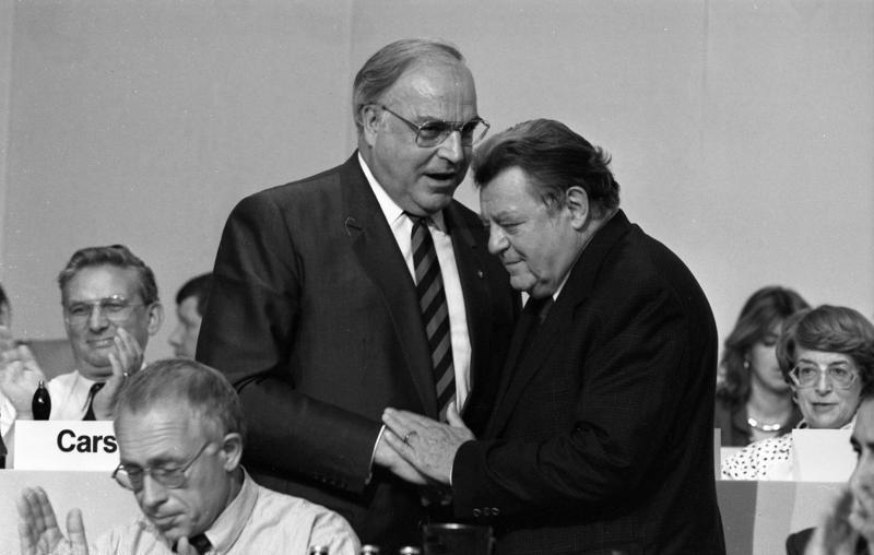 13.06. - 15.06.1988 36. CDU-Bundesparteitag in der Rhein-Main-Halle in Wiesbaden